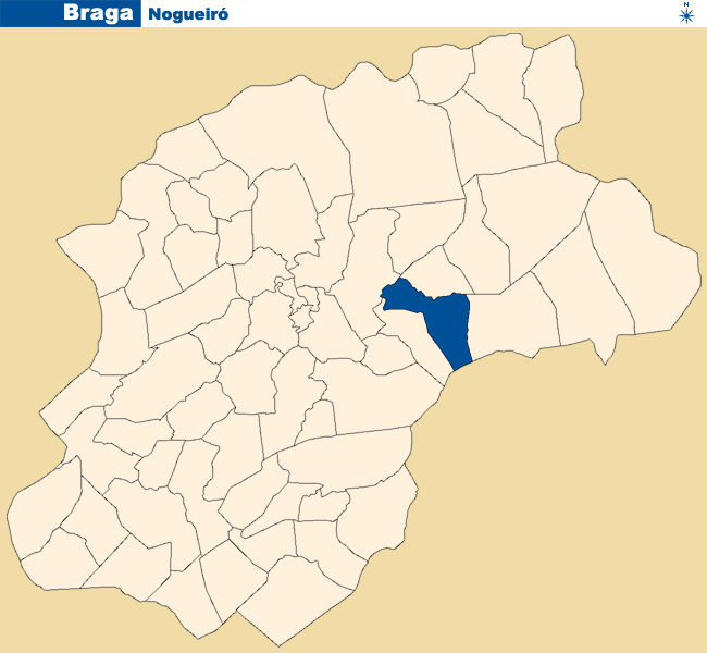 Localização de Nogueiró no concelho de Braga.